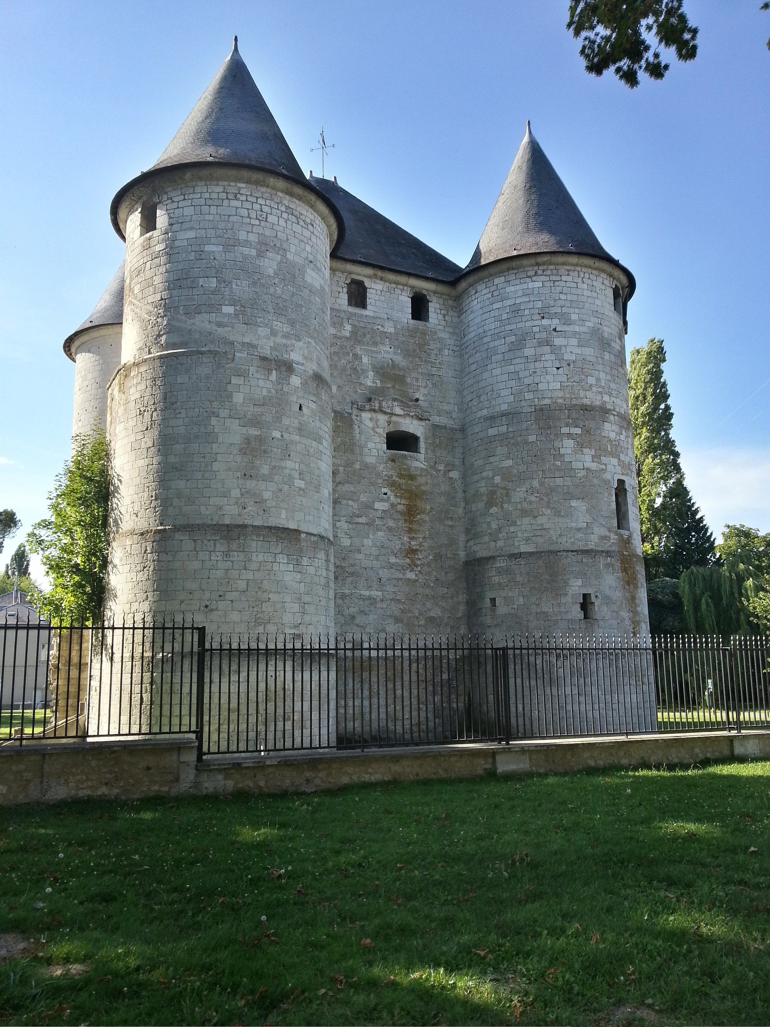 Façe Sud-Est du Château des Tourelles, rive droite de la Seine, à Vernon, département de l'Eure, France.